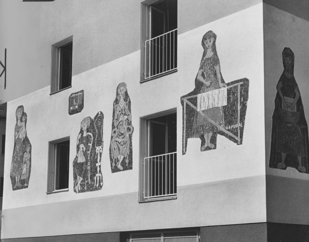 Glas- und Keramikmosaik, 1956–1957, Gemeindebau Sanatoriumstraße 19-25, Wien-Penzing (HRP 00218) This media shows the Vienna residential building (Gemeindebau) with the ID 1045.